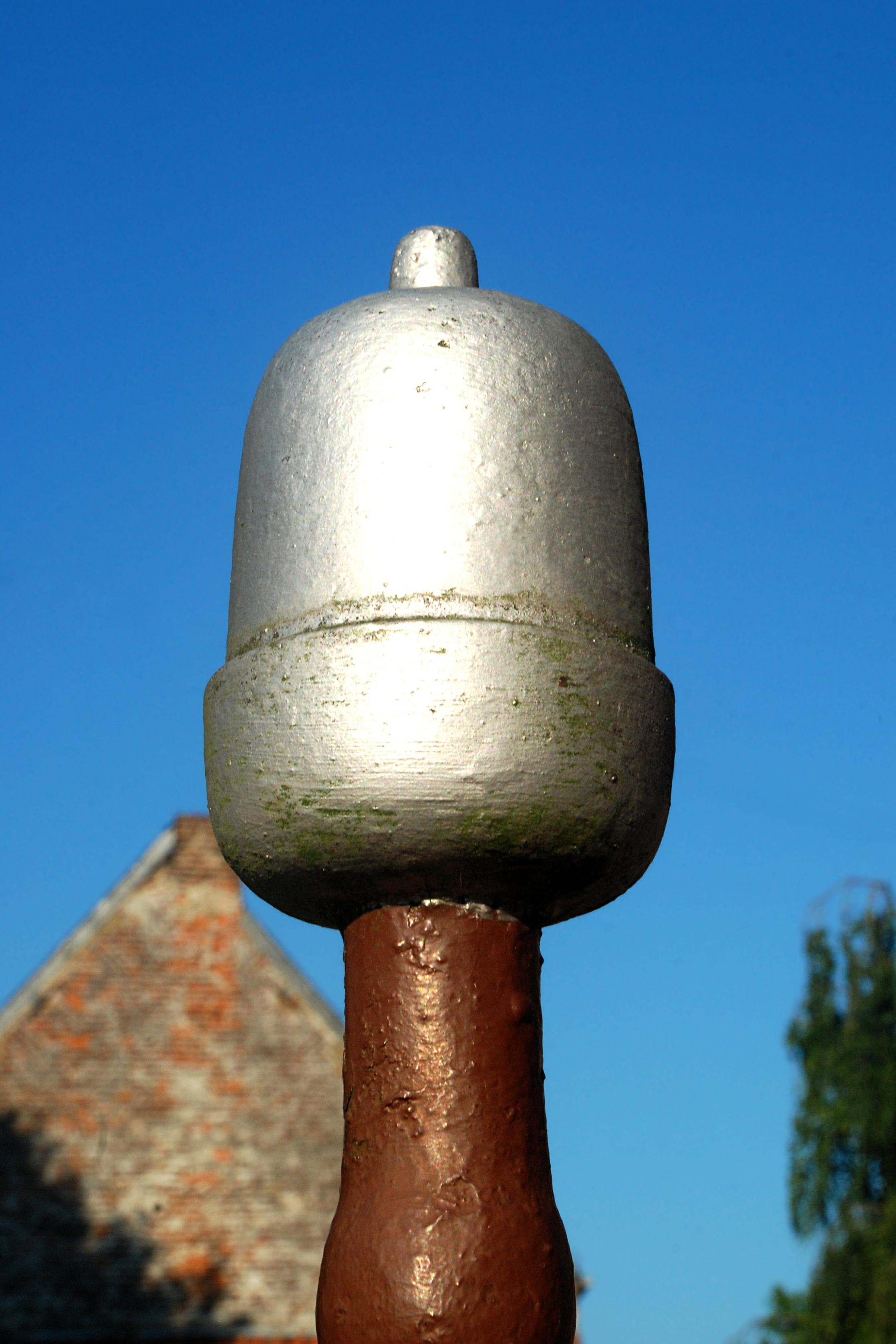 Belgique - Brabant wallon - Genappe - Ways - Mausolée Duhesme (tombe du Général Duhesme, mort des suites des blessures encourues à la bataille de Waterloo)